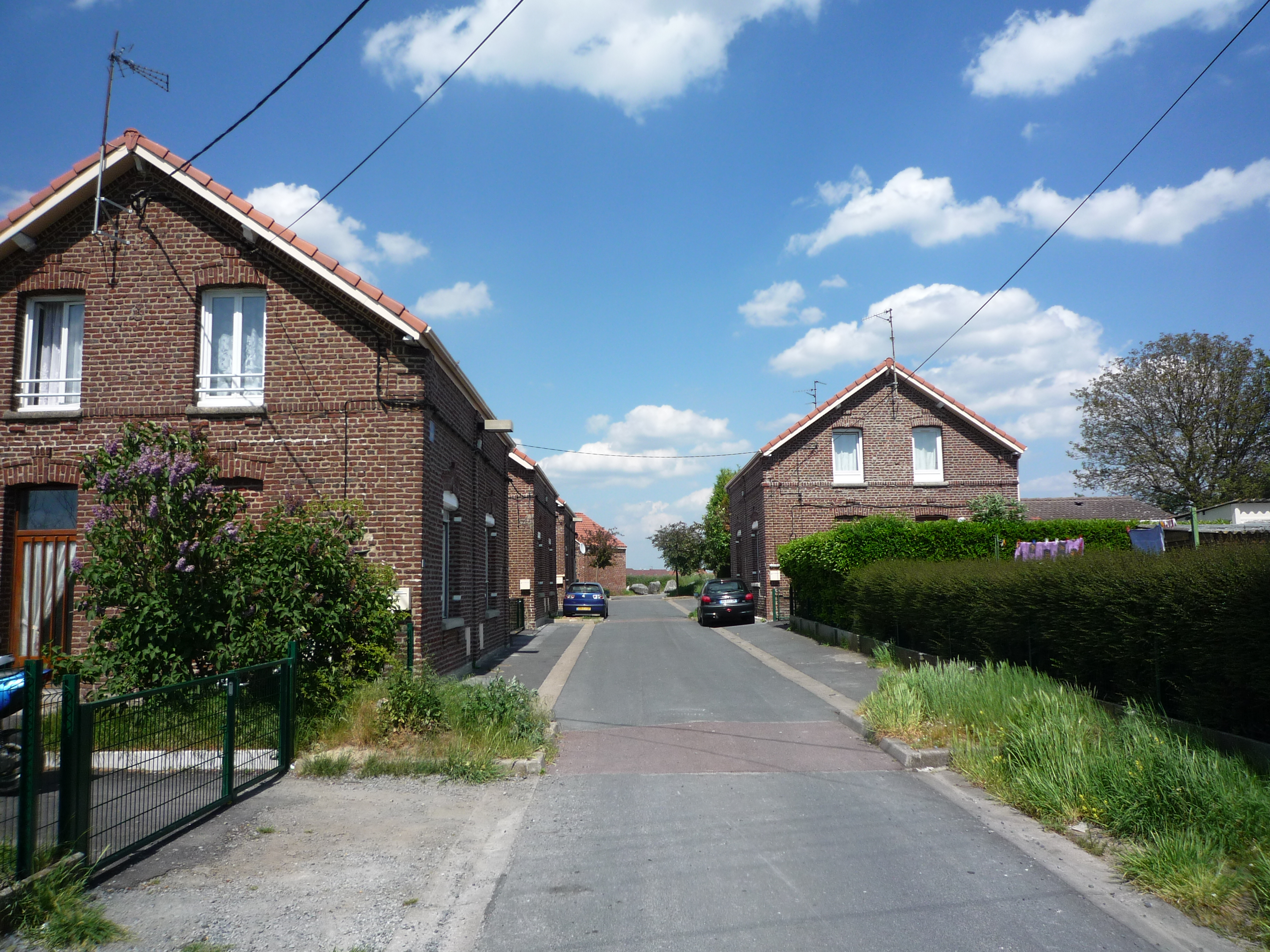 Cité de la fosse Cuvette à Escaudain.